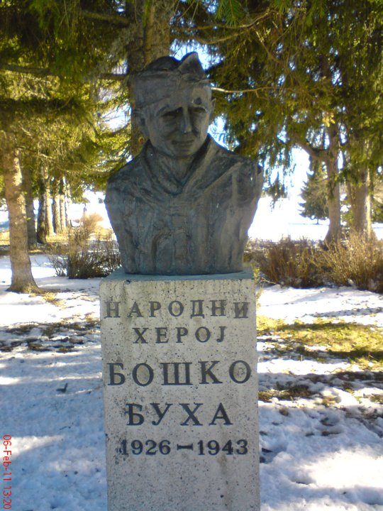 Bosko Buha spomenik Jabuka